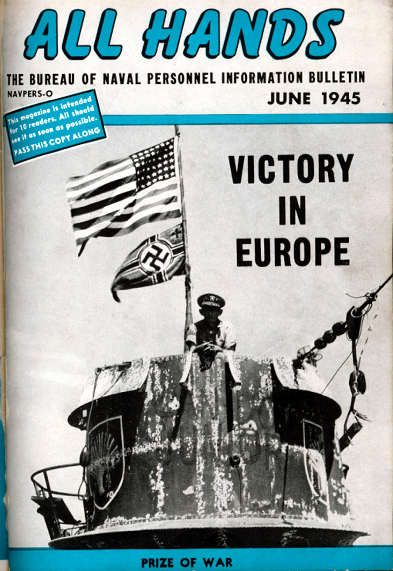 第一本真正以All Hands命名的美國海軍官方雜誌